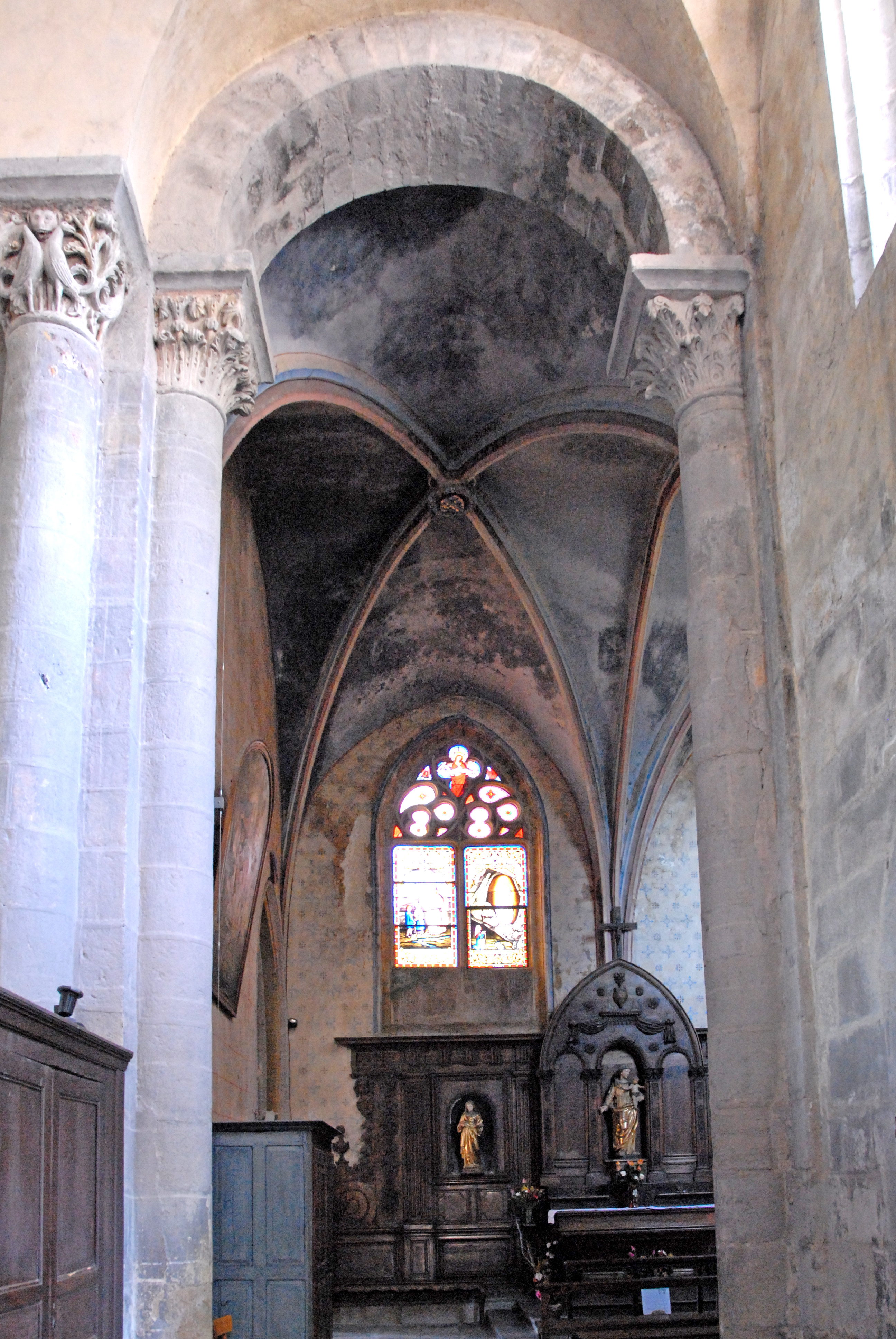 Mozac, Querhaus aus südl. Seitenschiff